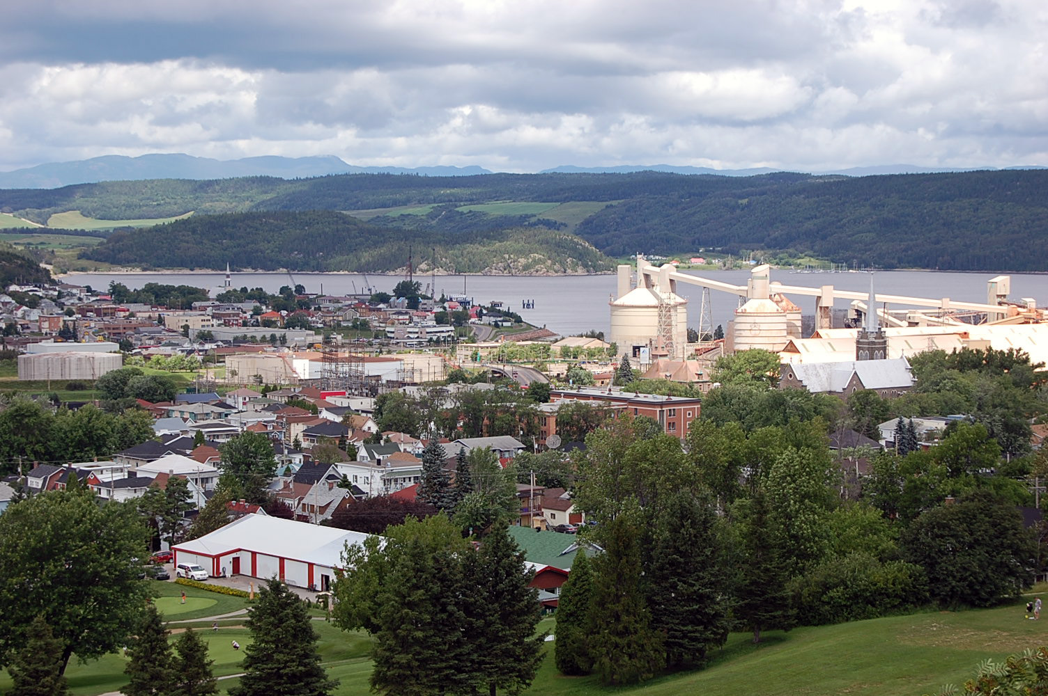 Ville de La Baie (Port-Alfred et Bagotville)